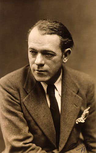 Portrait du peintre français Jean Dufy (1888-1964)